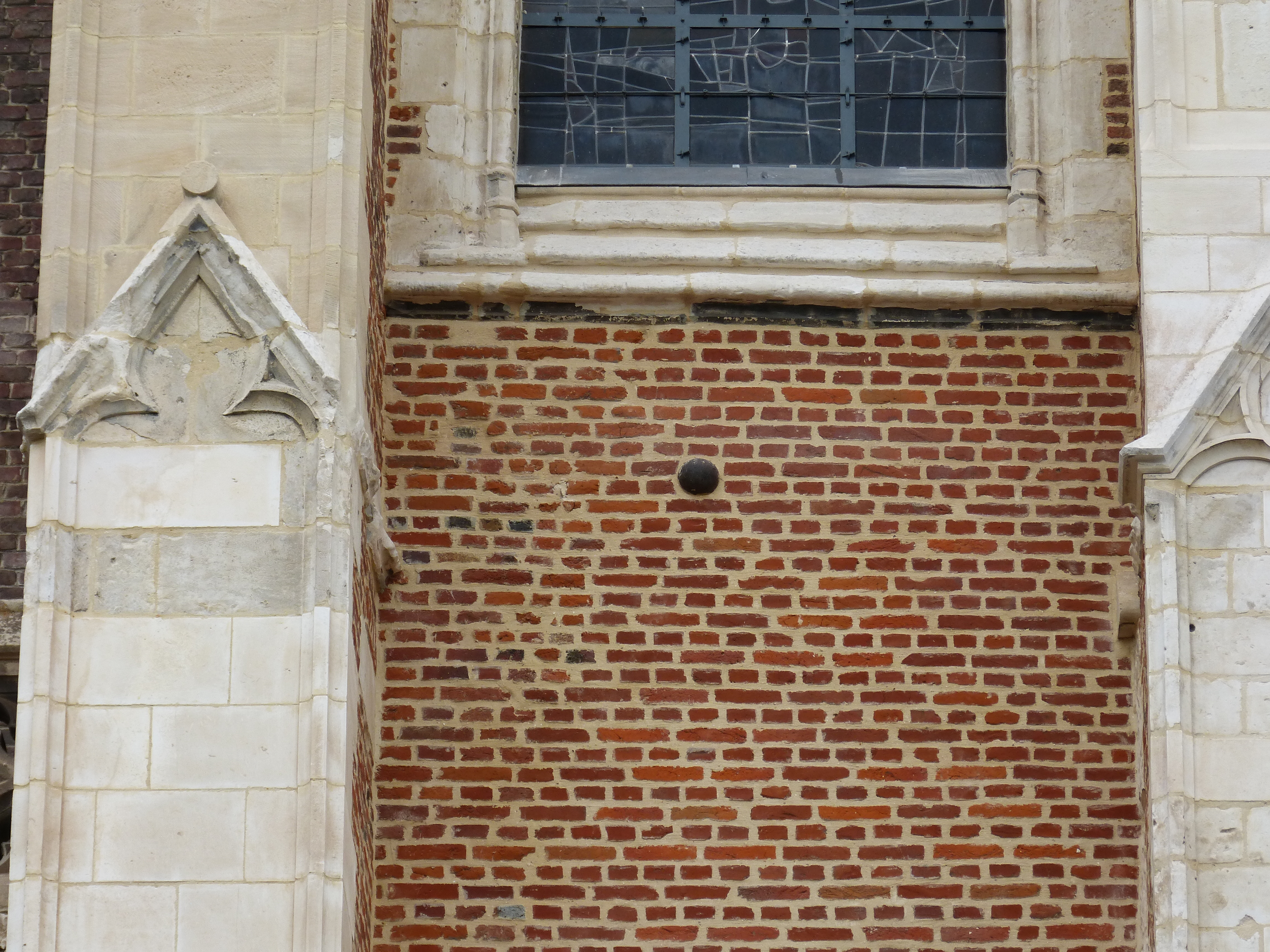 Détail du boulet de canon, présent sur la partie sud du mur extérieur du transept